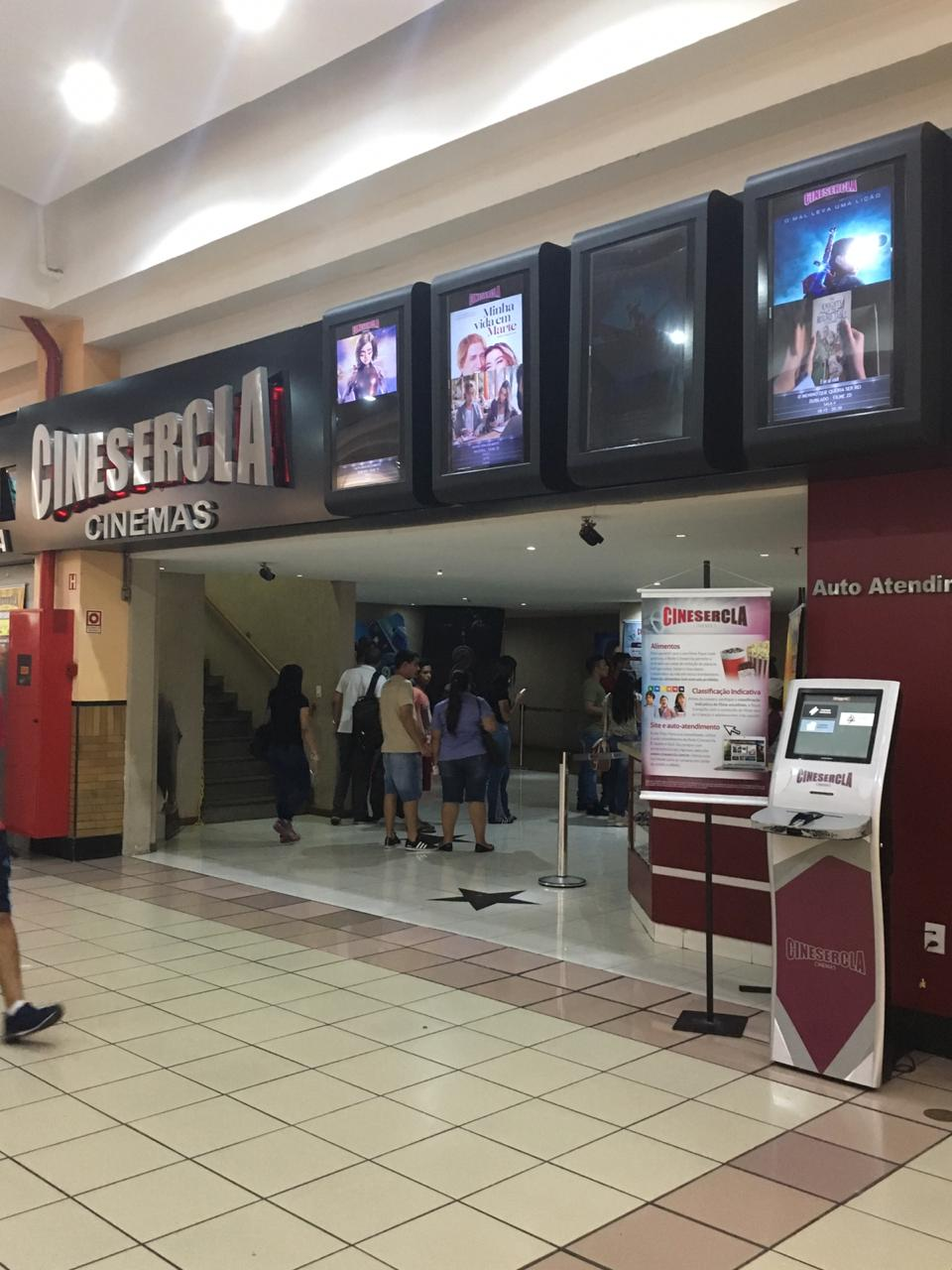 Área externa do cinema Cinesercla do instalado no Shopping Osasco Plaza